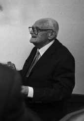 Theodor Maunz am 01.09.1991 bei der Feier seines 90. Geburtstags im Würmtaler Gästehaus in Gräfelfing. Theodor Maunz war Jurist, Hochschullehrer, Publizist (u.a.: National-Zeitung), Bayrischer Kultusminister (1957 bis 1964) Teilnehmer am Verfassungskonvent auf Herrenchiemsee, „Nestor“ des Grundgesetzes der Bundesrepublik Deutschland